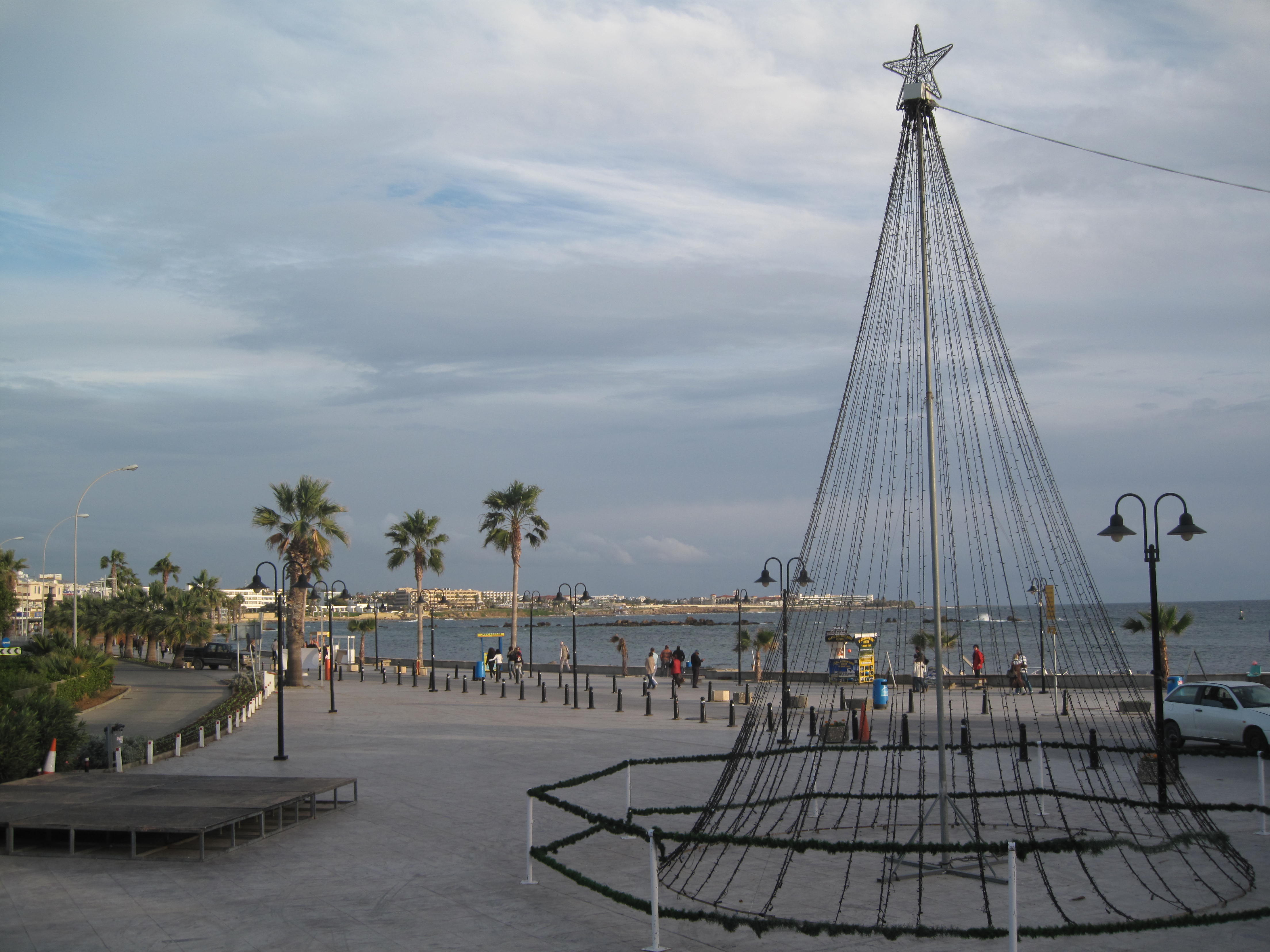 Paphos boulevard